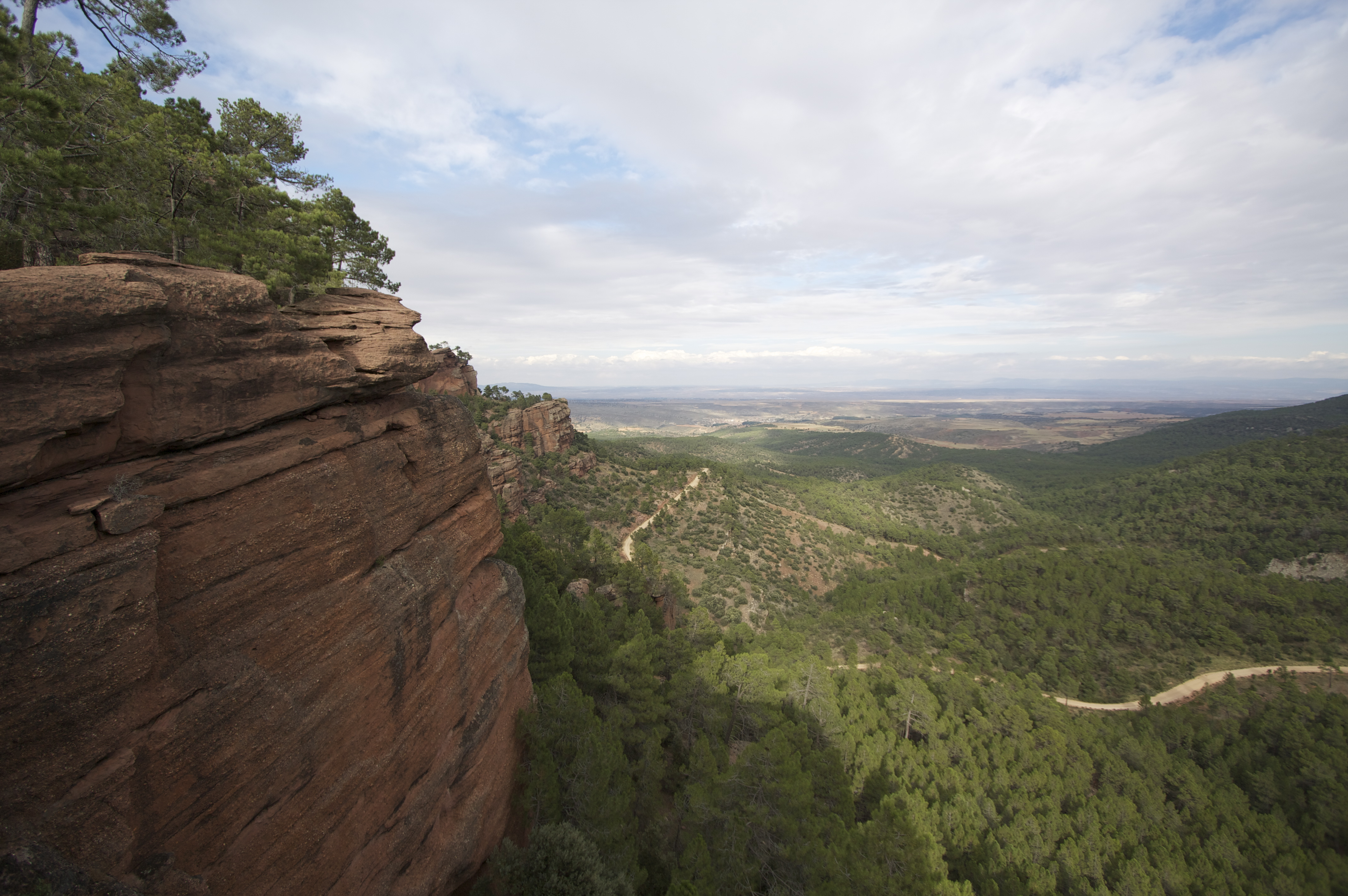 Paisaje protegido de los Pinares de Ródeno